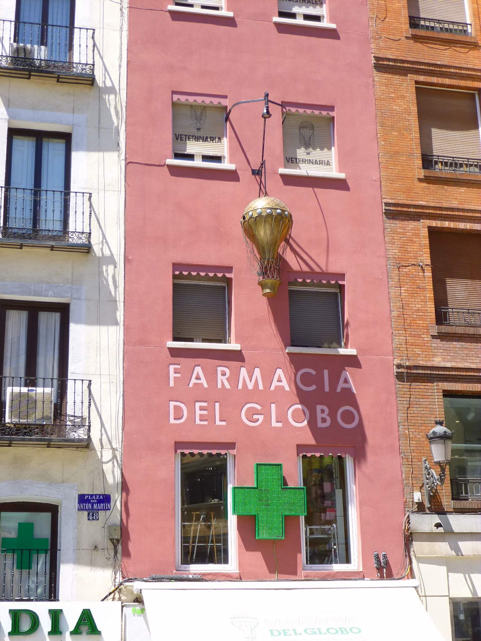 Farmacia del Globo, en la Plaza de Anton Martín (Madrid)